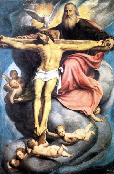 Il Pordenone - trinità (1530-1535) - Duomo di san Daniele